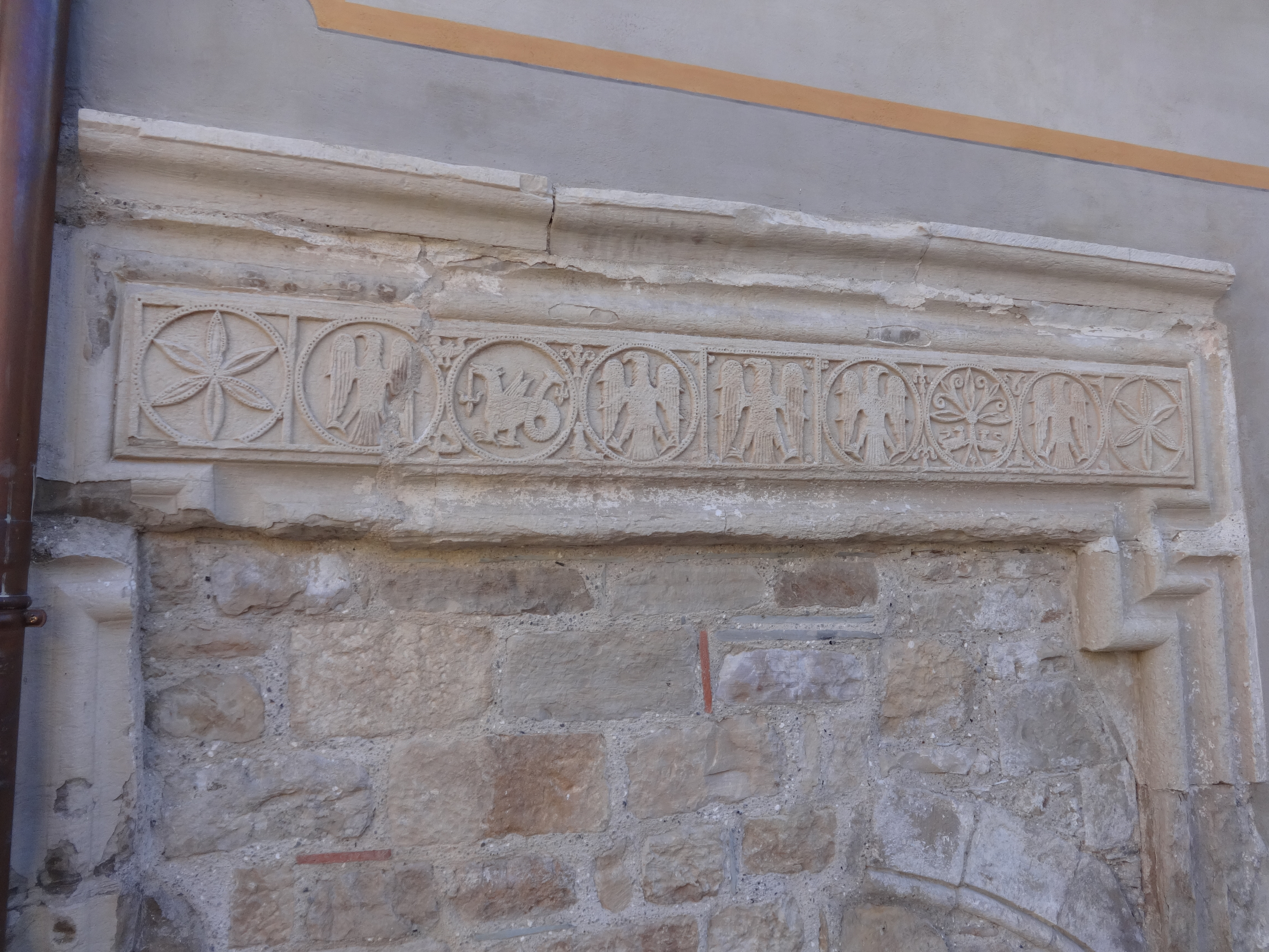 Villemagne-l'Argentière (Hérault) - Hôtel des monnaies - linteau orné de médaillons.